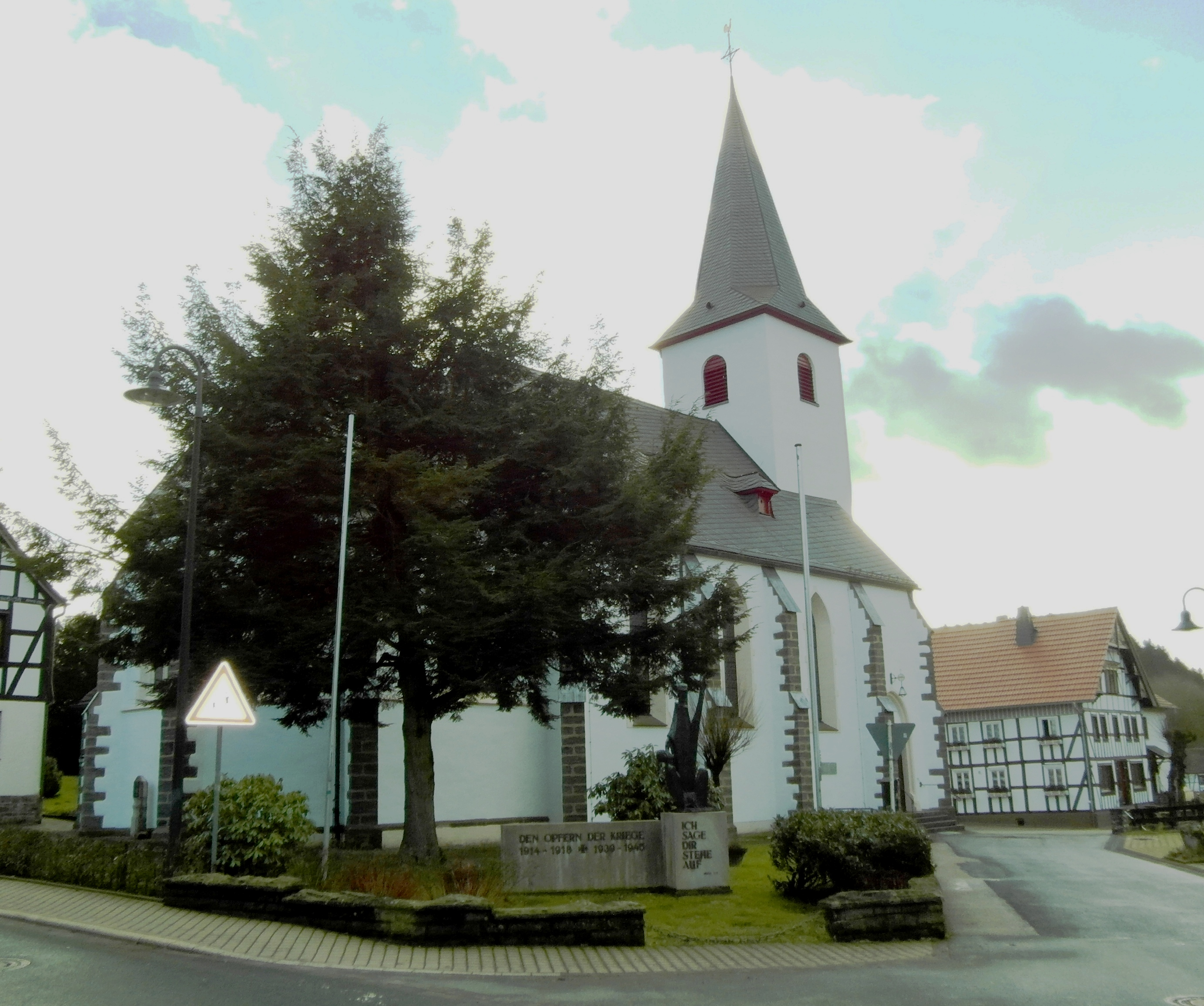 St. Johannes Baptist in Finnentrop-Serkenrode, erbaut 1901